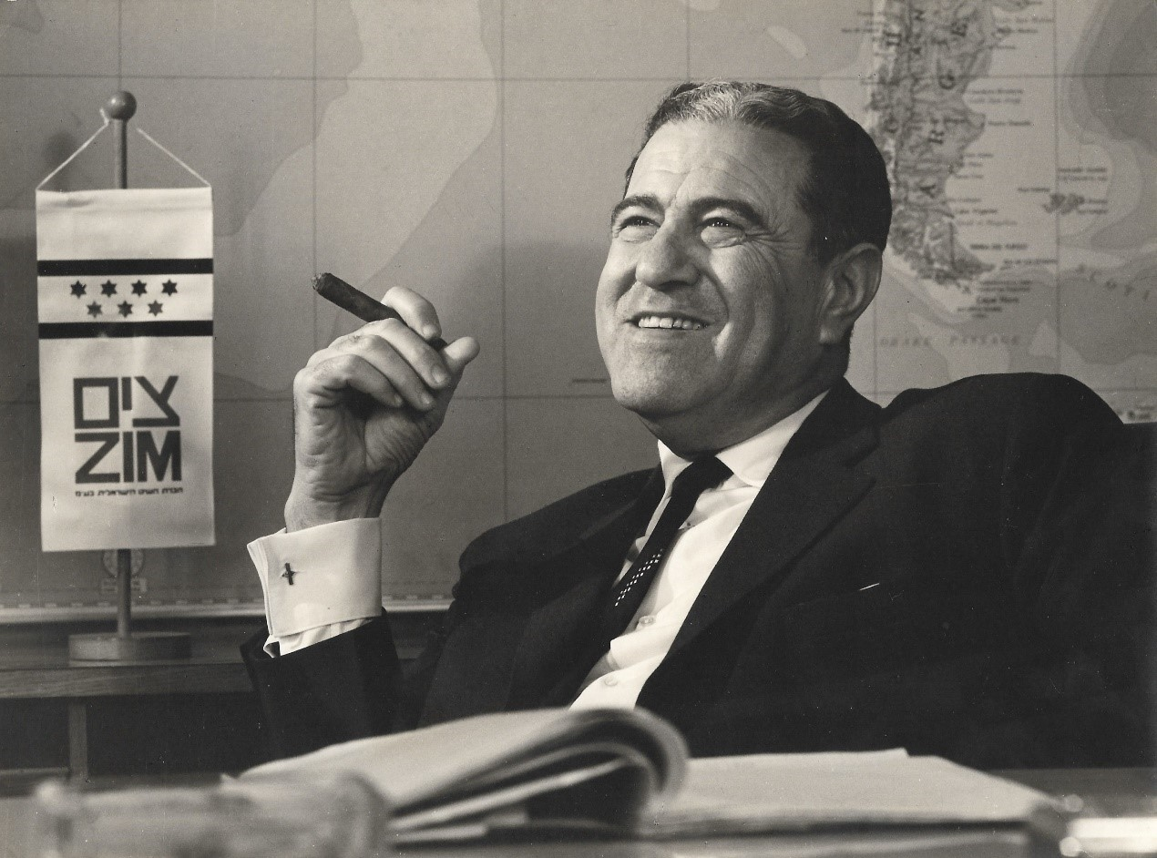 מאיר גירון במשרדו כמנכ"ל צים 1967